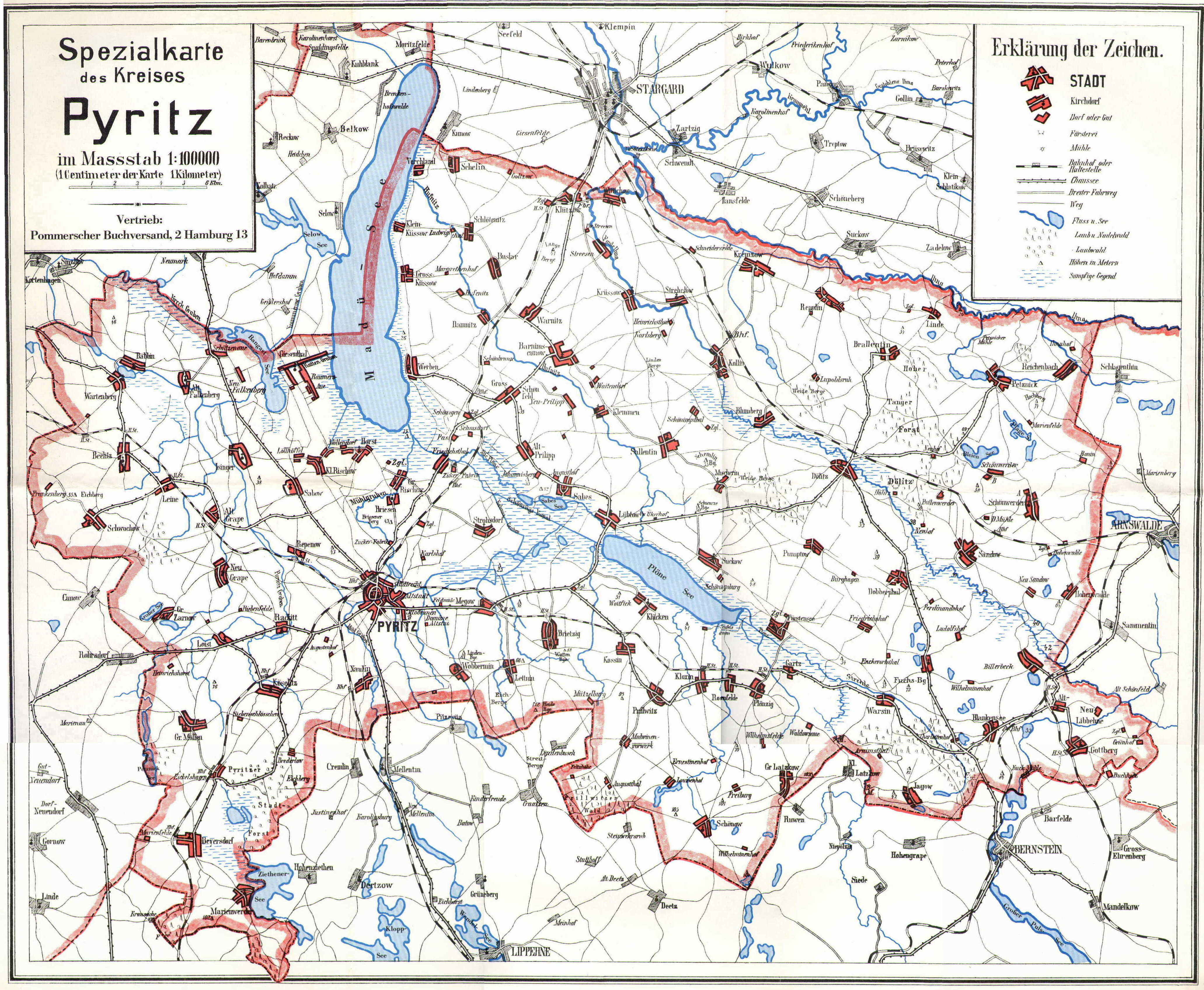 Vorkriegskarte von Pyritz und dem Kreis Pyritz